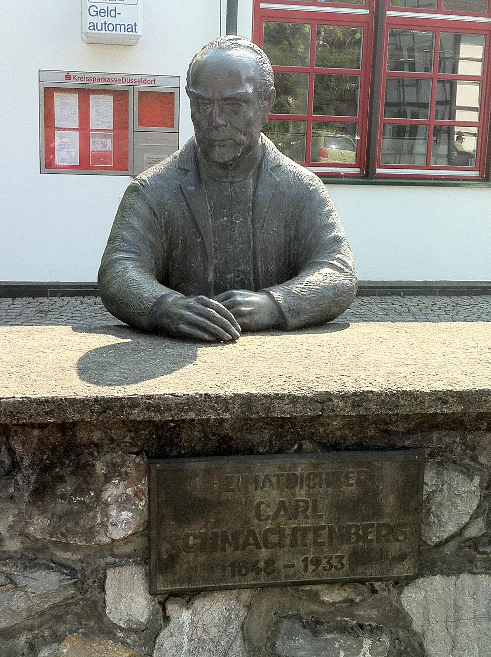 Bronzestatue des Heimatdichters Carl Schmachtenberg auf dem Marktplatz in Wülfrath-Düssel